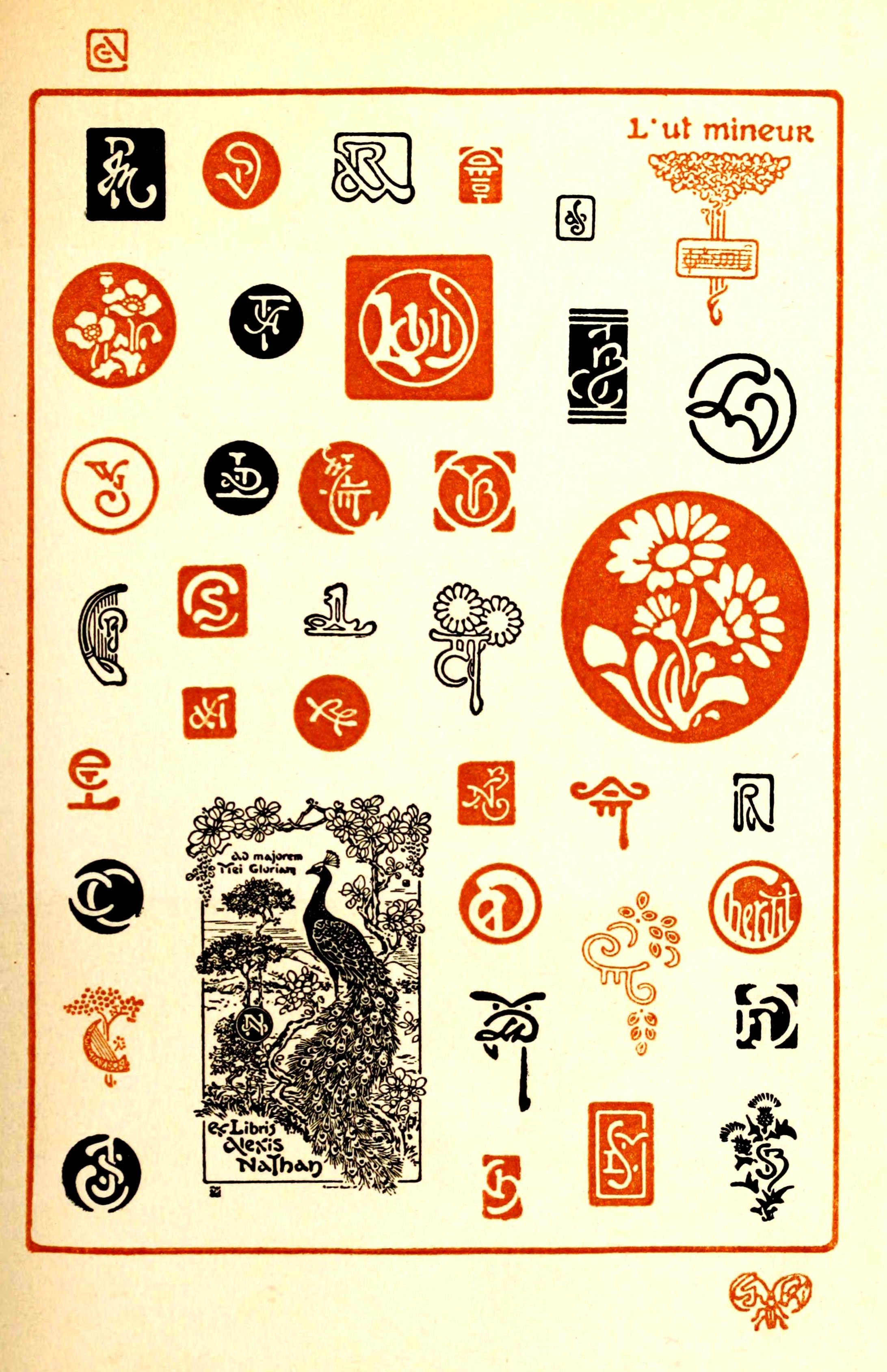 Monogrammes, Marques, Ex Libris